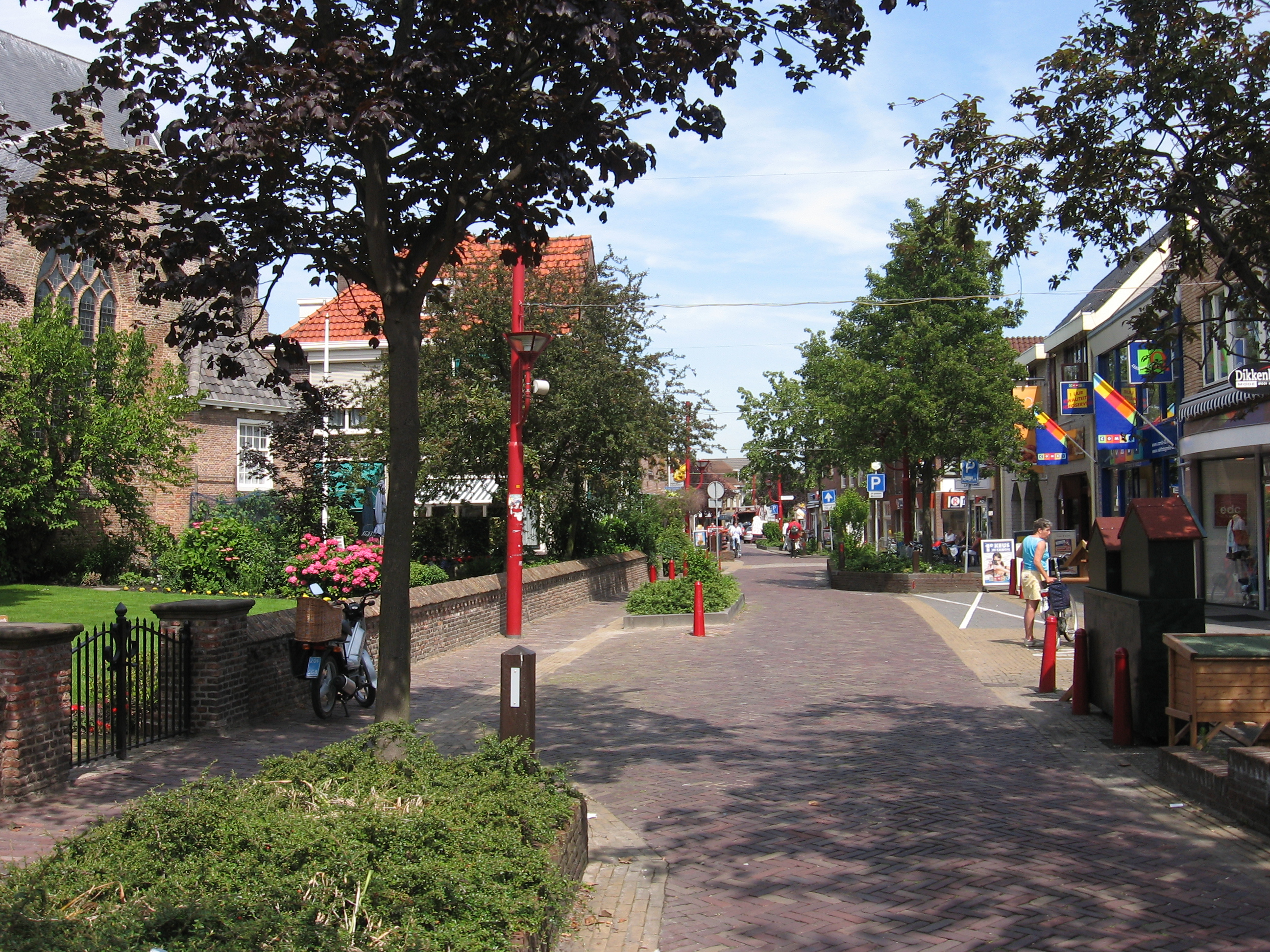 De Lier, hoofdstraat